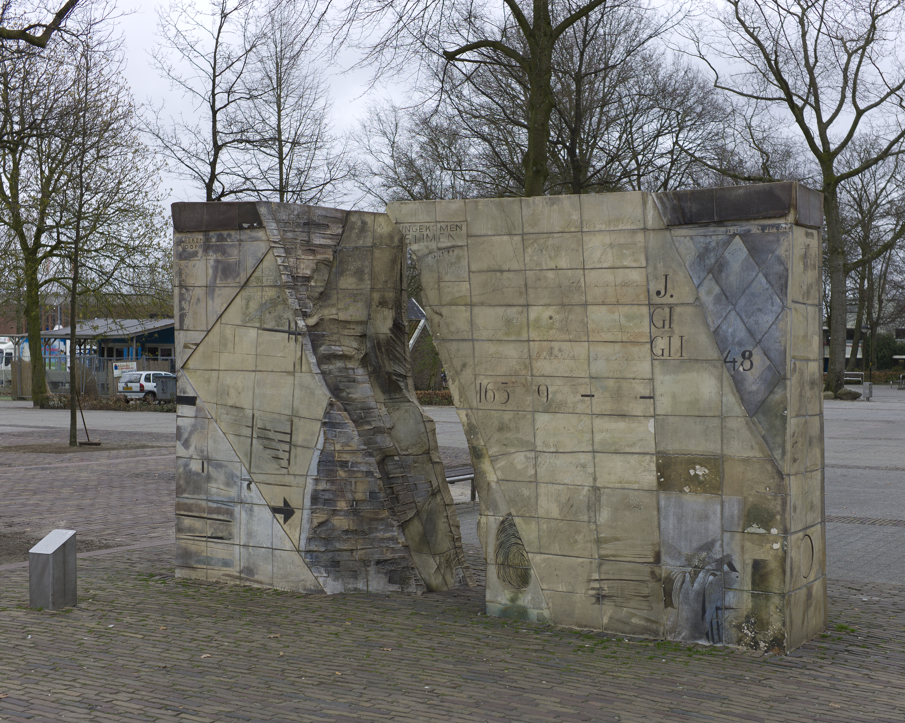 Gedenkmonument in het centrum van Emmen, dat bestaat uit een beeld van keramiektegels dat een opengescheurde archiefdoos voorstelt. In de archiefdoos zijn fragmenten van archiefstukken van de gemeente Emmen afgebeeld, maar ook het gedicht 'de achttien doden' van Jan Campert. Met het openscheuren van de archiefdoos willen de kunstenaars aangeven dat er (in archieven) nog vele stukken die herinneren aan de Tweede Wereldoorlog bewaard zijn gebleven, en die aan de vergetelheid ontrukken.